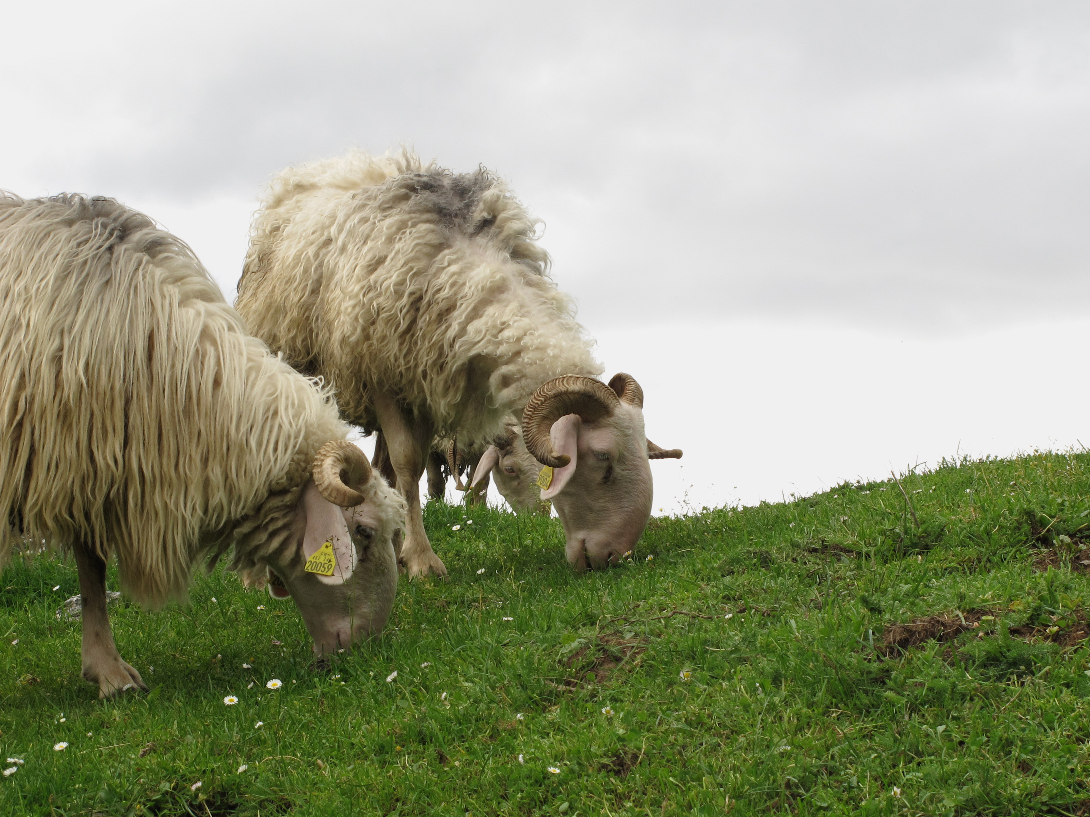 Son ovejas aunque tengan cuernos, :)) En mayo los pastores llevan a las ovejas de venaneo a los valles de altas montañas. Según los expertos, el sabor de las flores de la montaña, que comen las ovejas en esos pastos de montaña, dan delicadeza y sabor al queso, considerado uno de los mejores del mundo